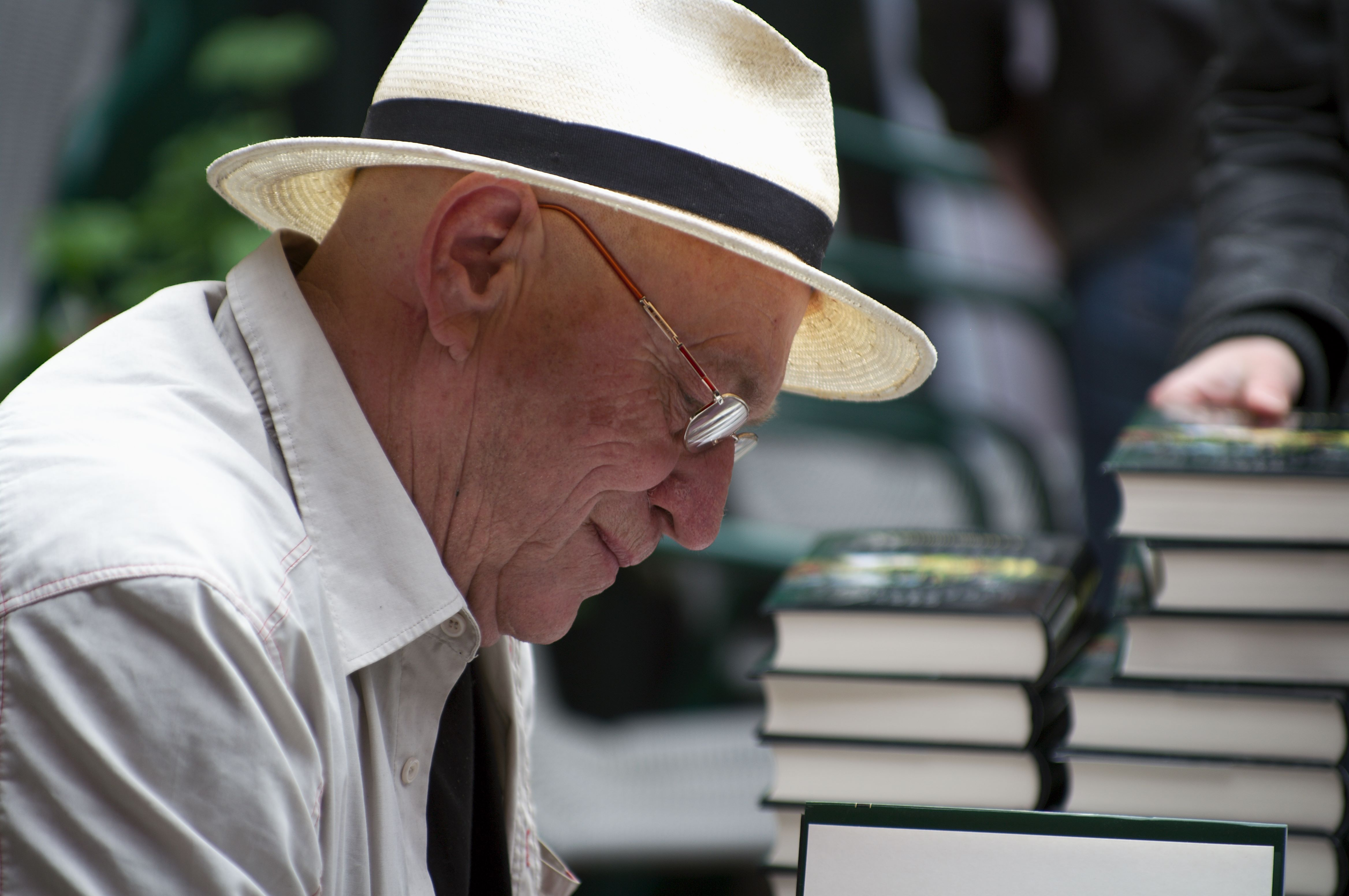 Gert Nygårdshaug at Oslo bokfestival 2011